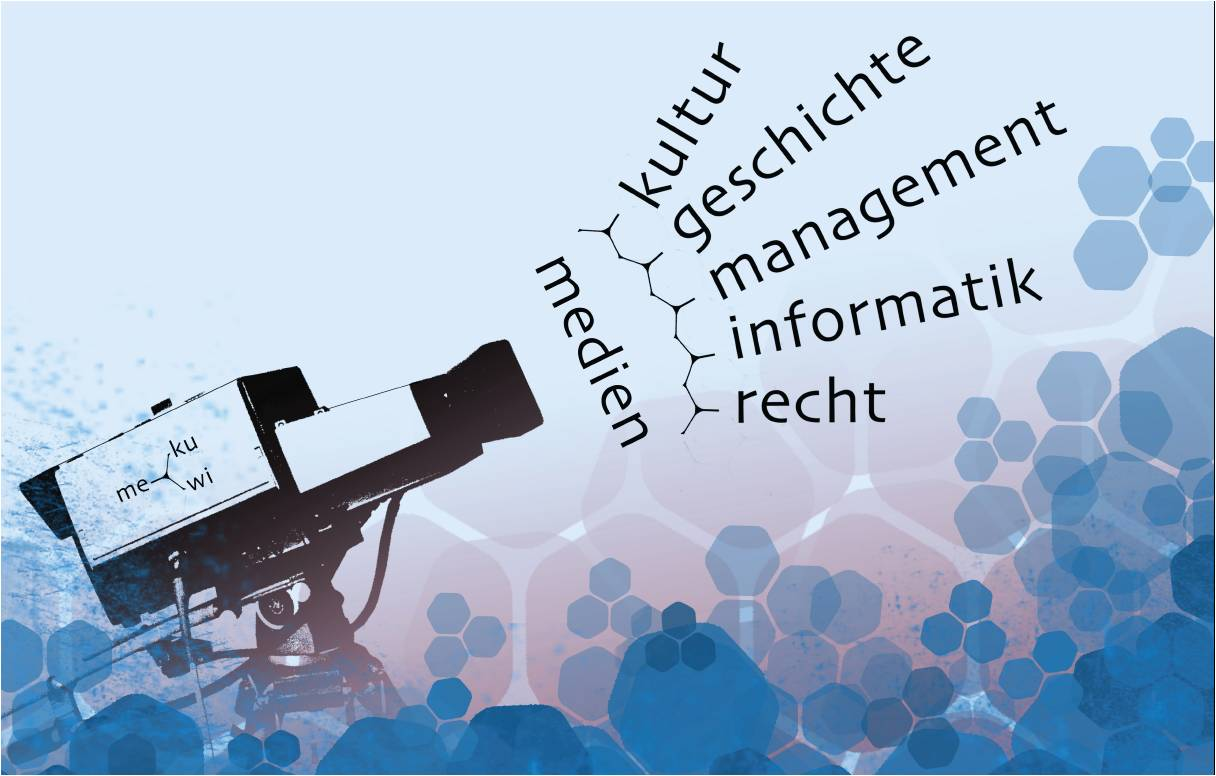 Logo des Studiengangs Medienkultur und Medienwirtschaft